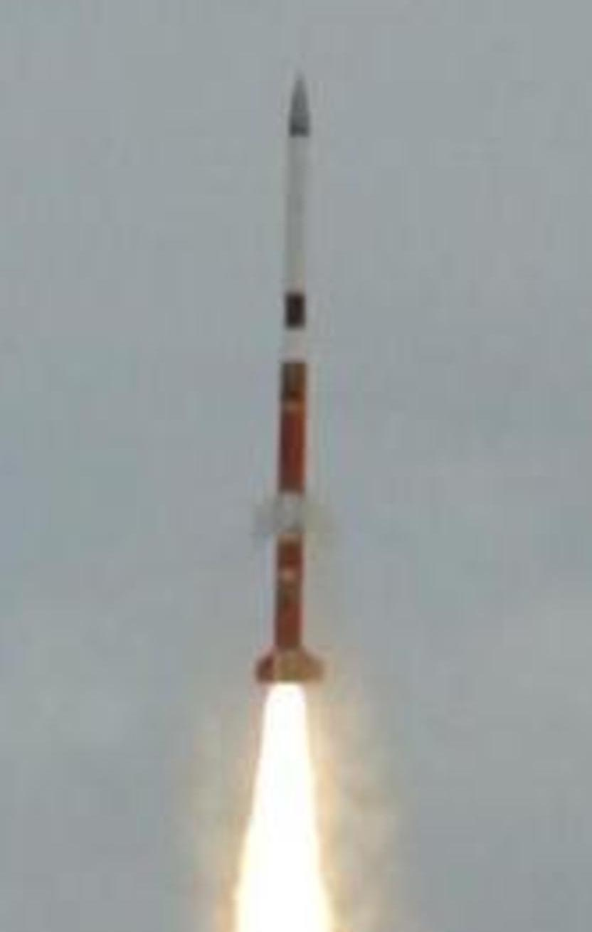 Lançamento do foguete brasileiro de médio porte VSB-30 V07 da Base de Alcântara